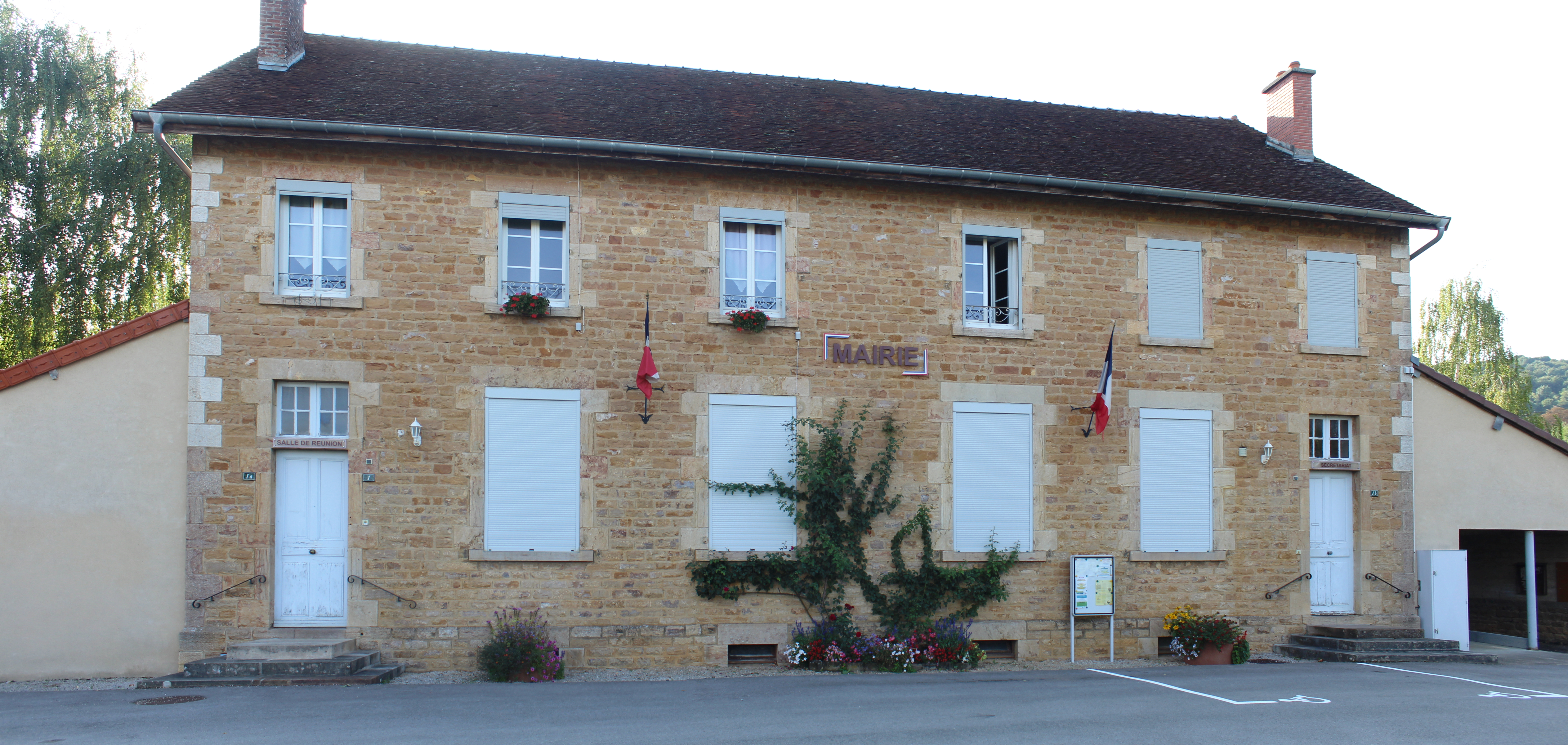 Mairie de Maynal.